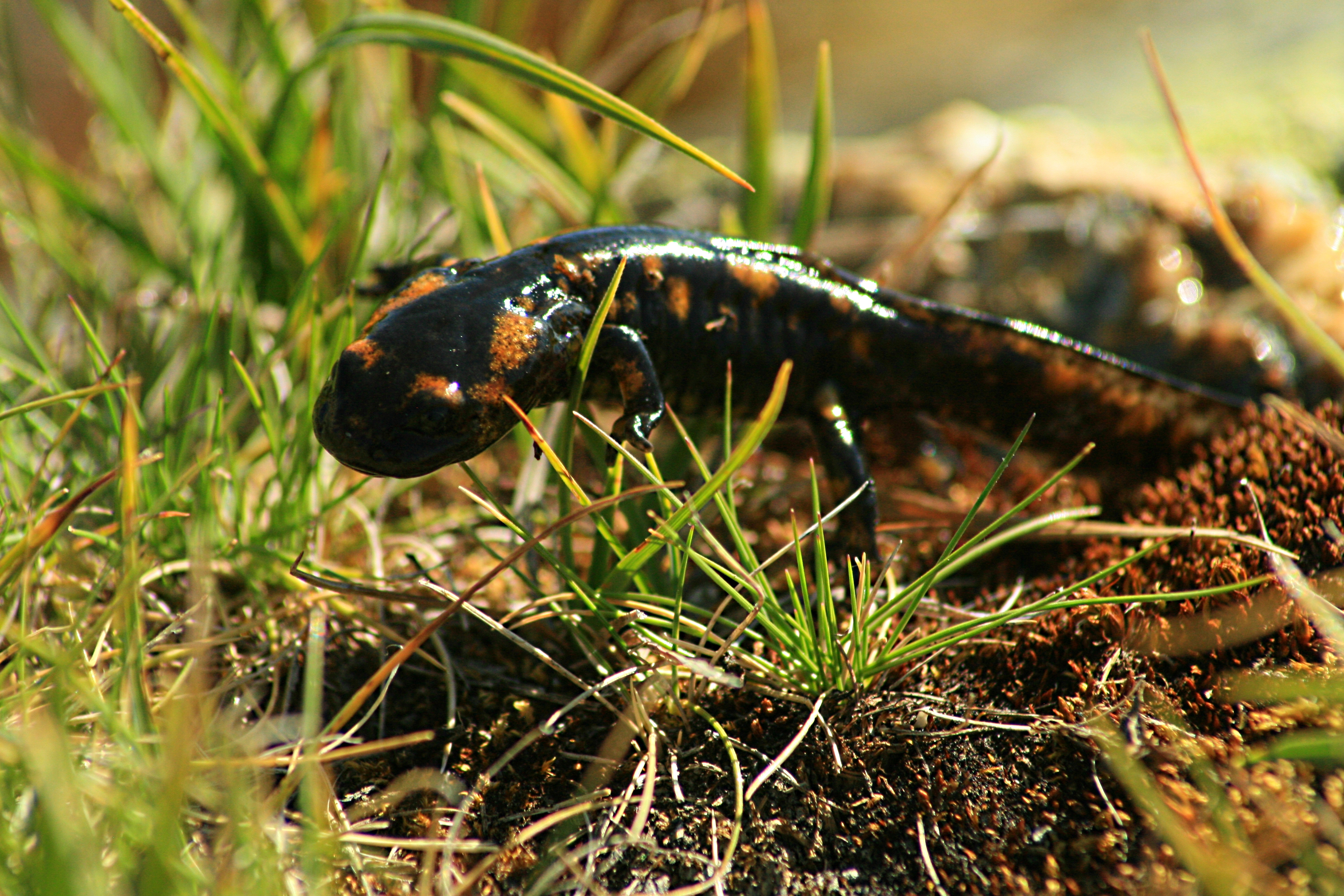 Ejemplar de Salamandra salamandra en una charca cerca de la Laguna de los Pájaros, sierra de Guadarrama, España.